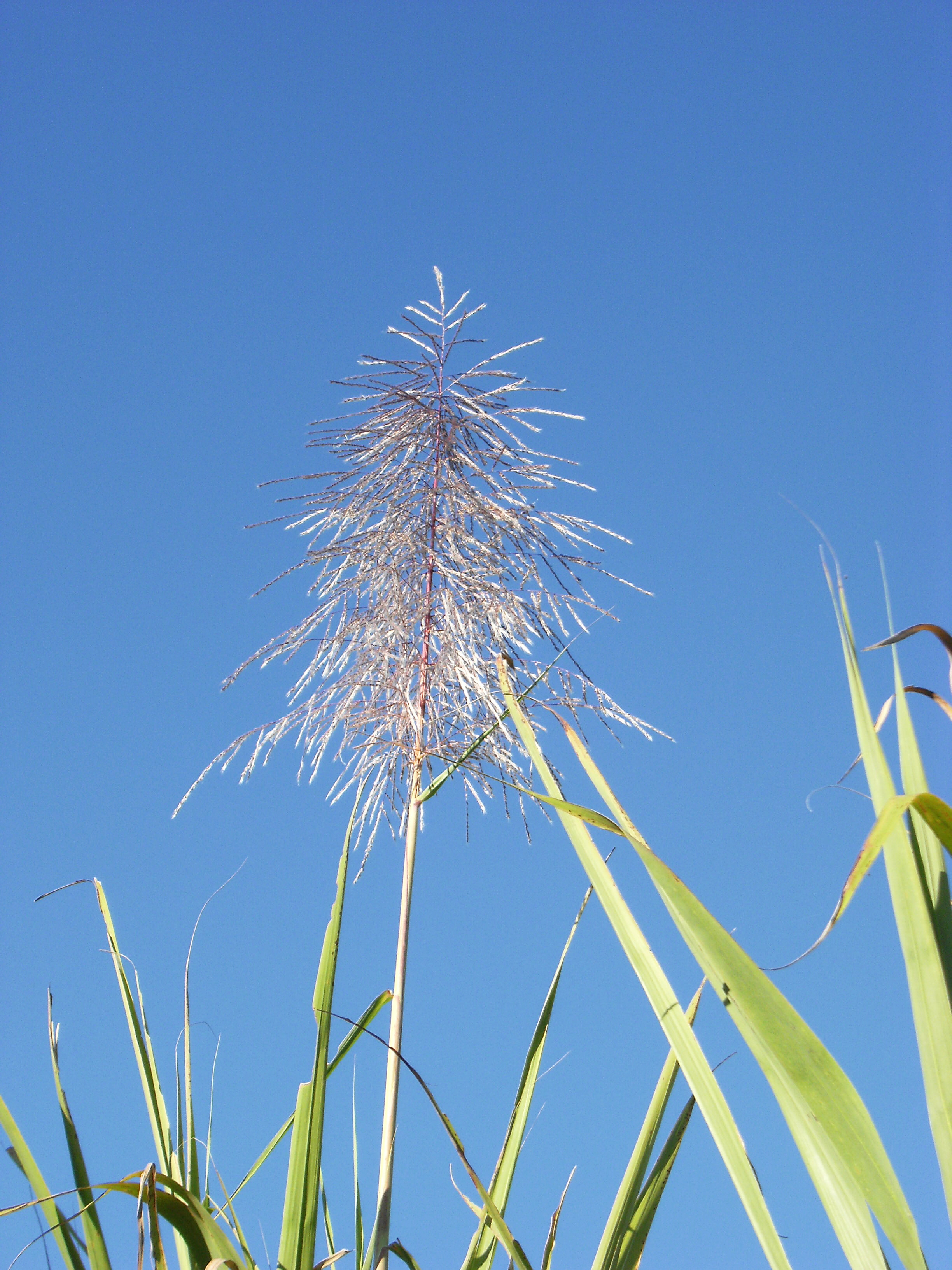 sugarcane